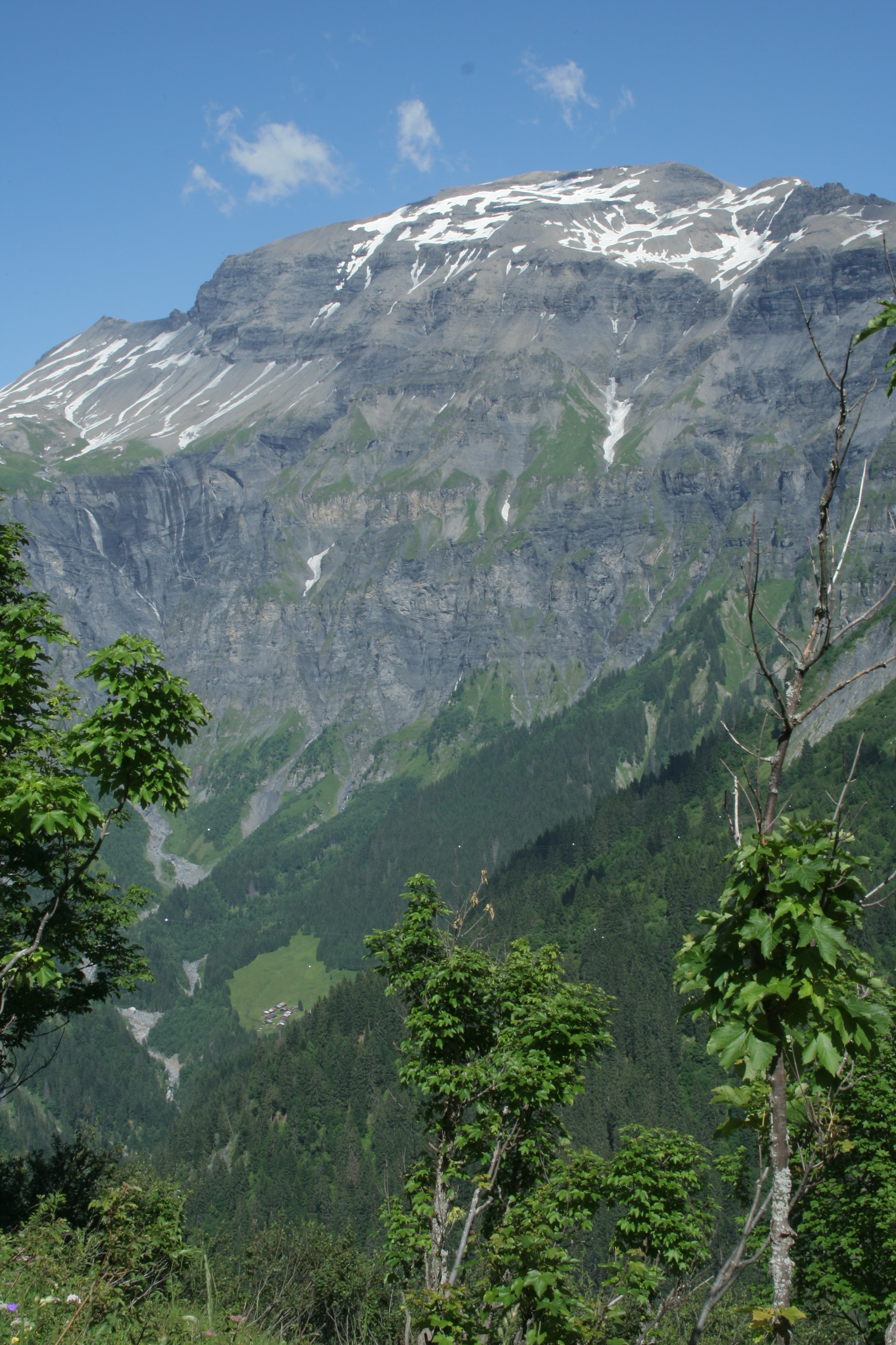 Mont Buet (3 096 mêtres) au premier plan le Cirque des fonds.